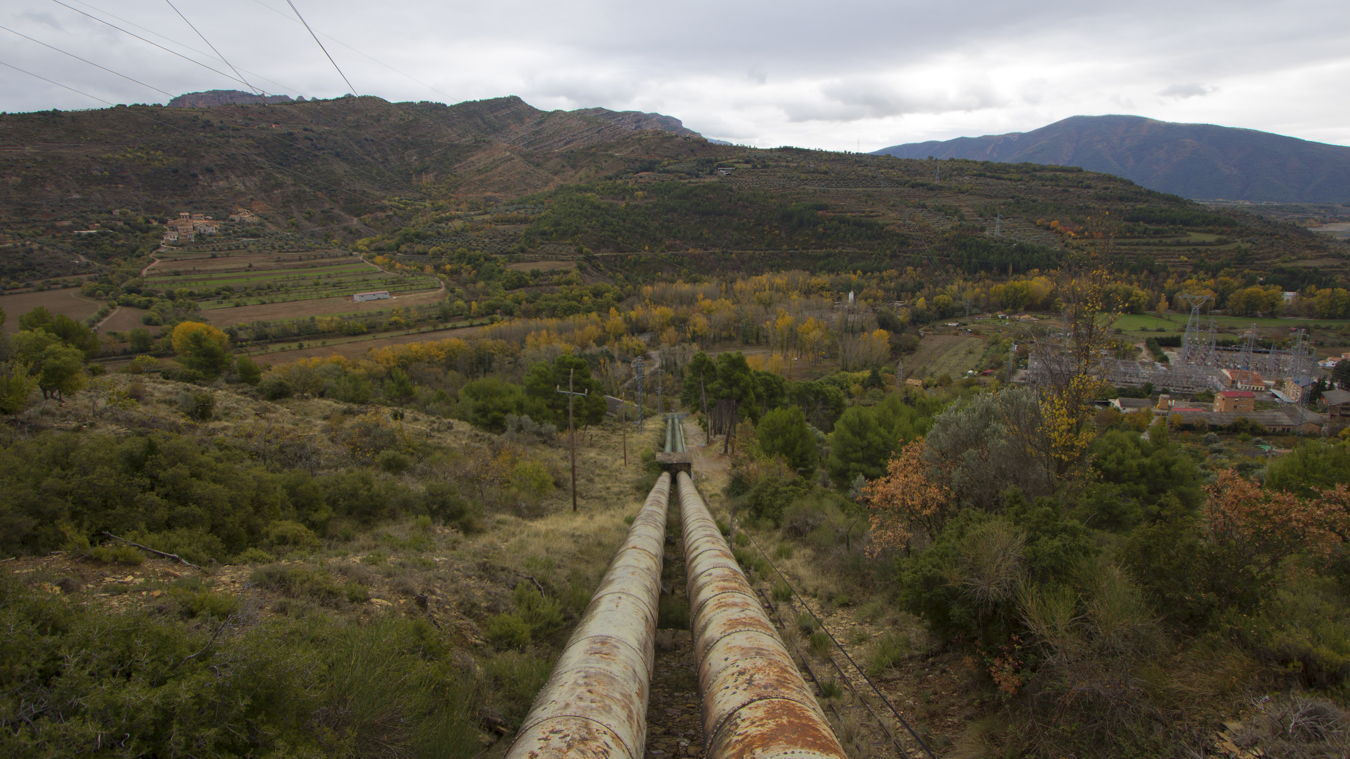 Canonades forçades de la central La Pobla de Segur (Pallars Jussà)